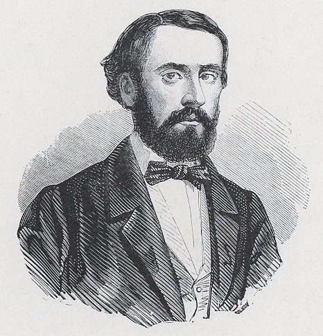 Ritratto di Desiderato Chiaves